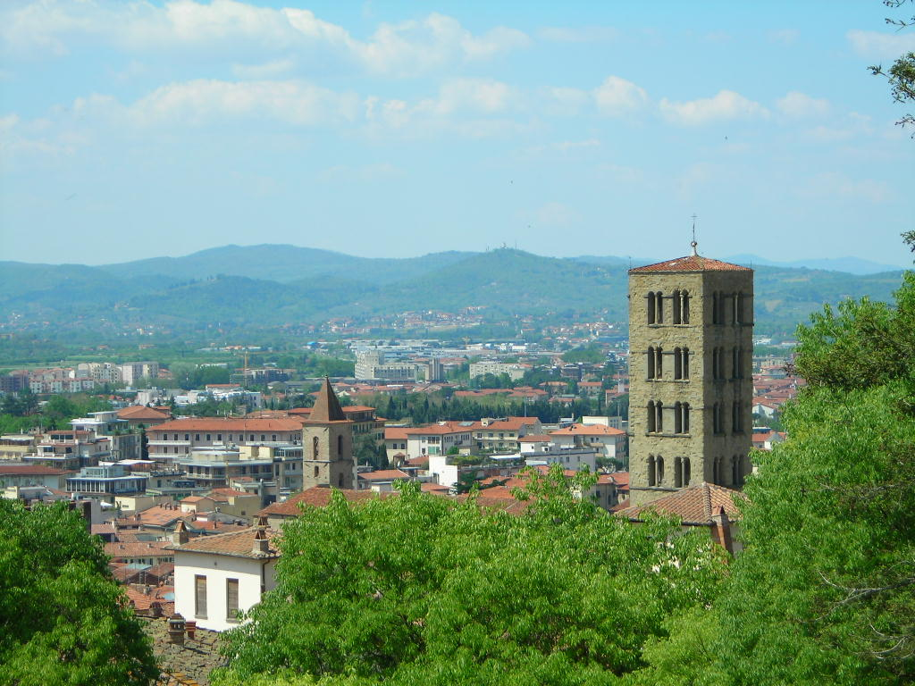 Arezzo